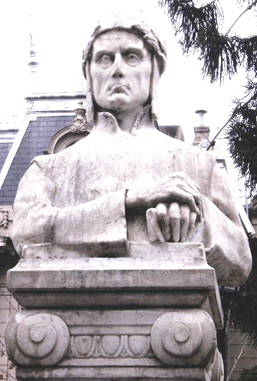 Imagen del Monumento a Dante Alighieri, del escultor Erminio Blotta, en Bv. Oroño enfrente de la Escuela homónima, Rosario, Argentina. Foto de Luis A. Blotta.